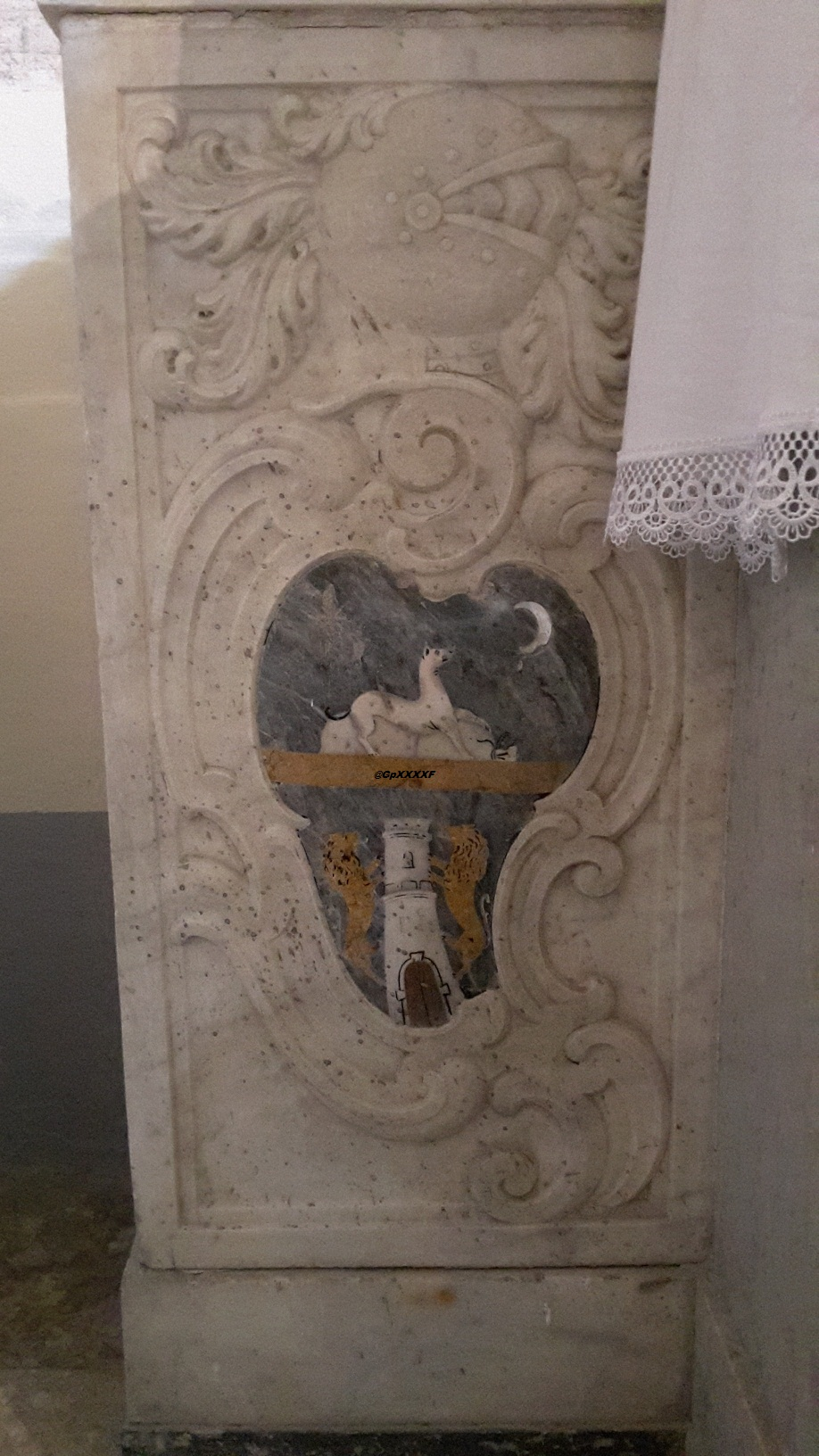 Stemma dei Nobili Farina di Saragnano